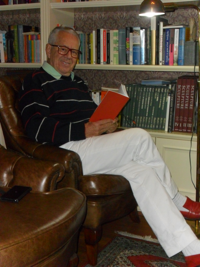 Luiz Coronel na Biblioteca em seu 79º aniversário